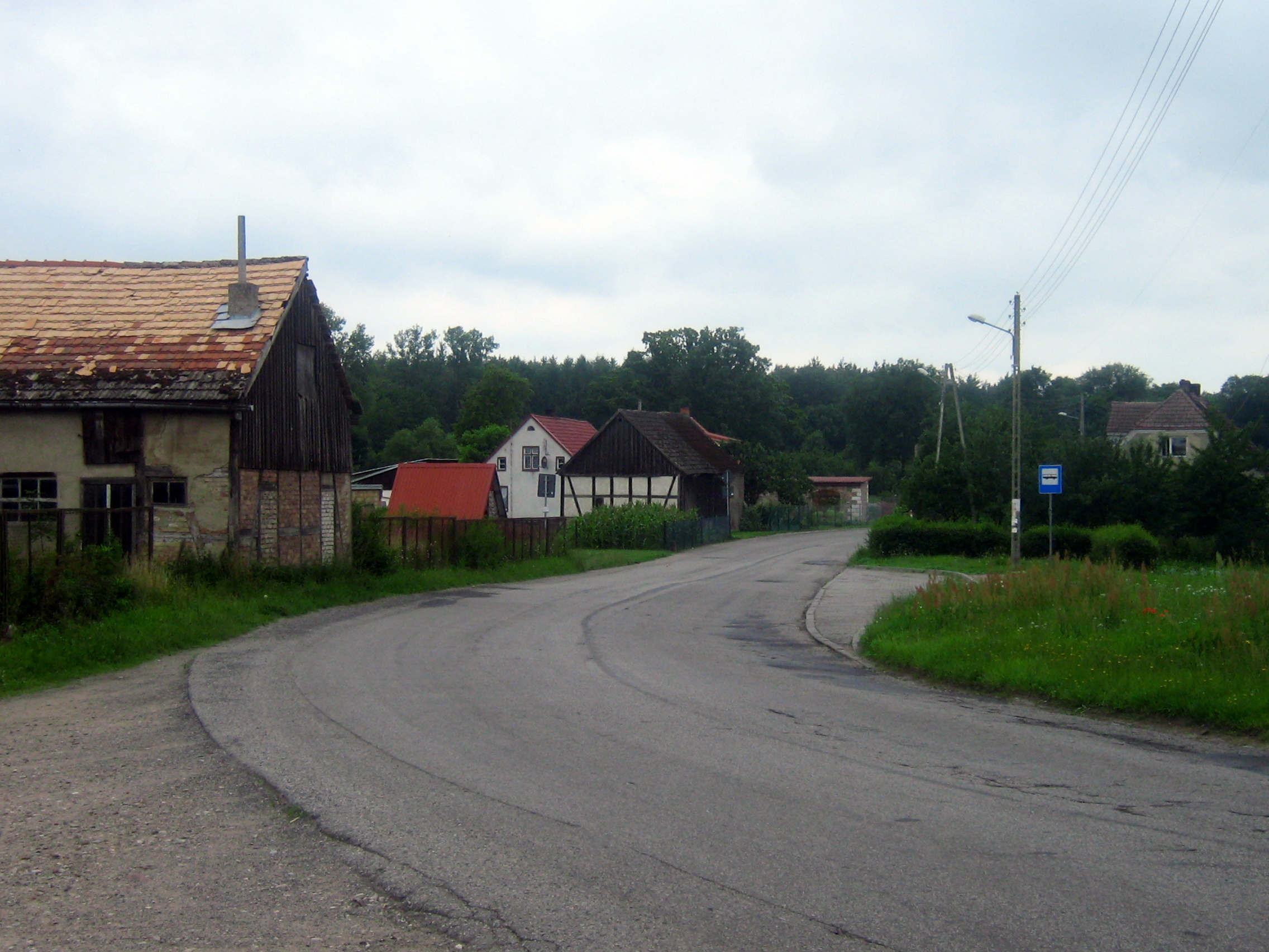 Niemica – wieś w Polsce położona w województwie zachodniopomorskim, w powiecie kamieńskim, w gminie Golczewo.